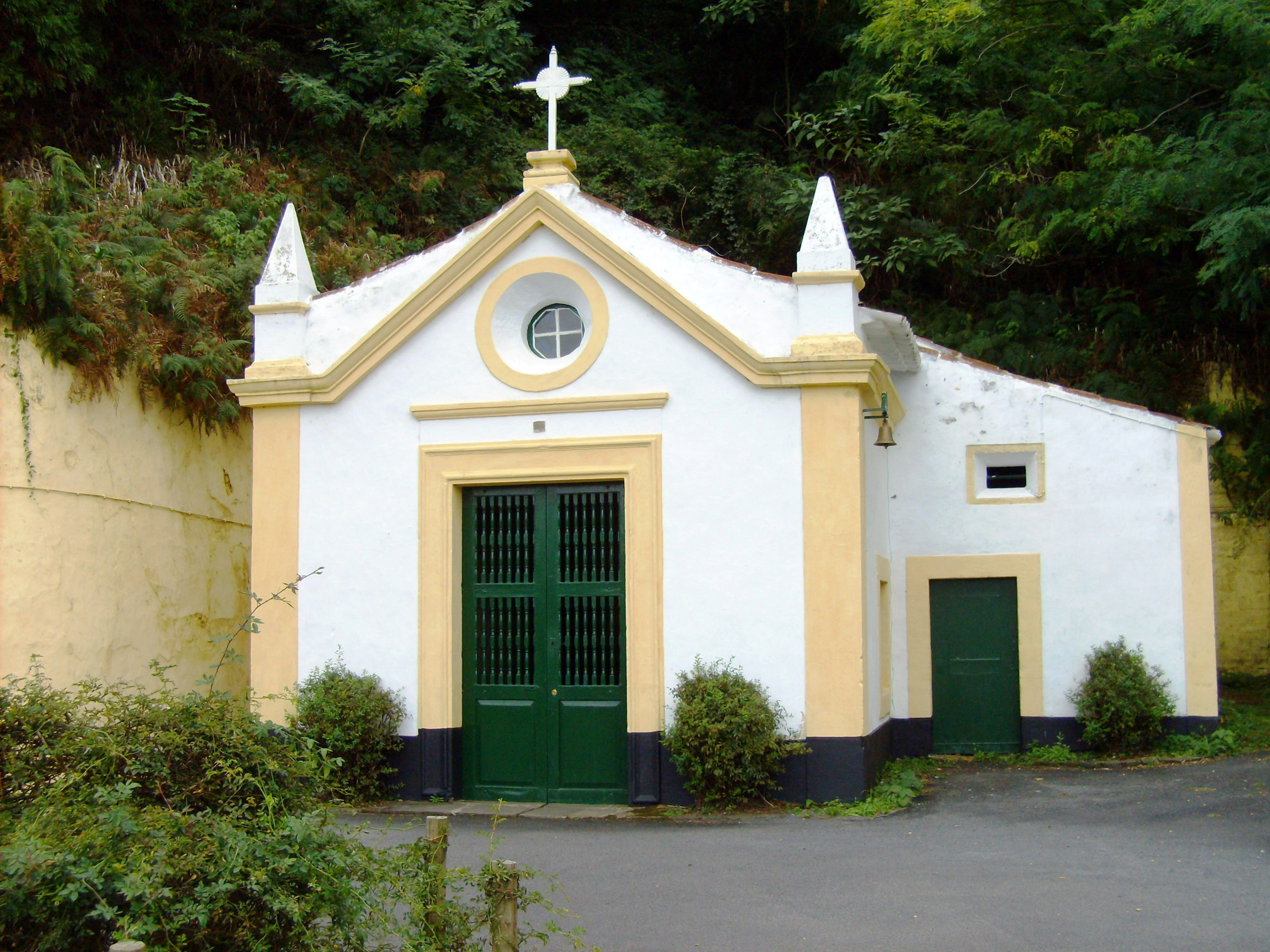 Fortaleza de São João Baptista do Monte Brasil, Angra do Heroísmo, Ilha Terceira, Açores: Ermida de Santo António (1615).